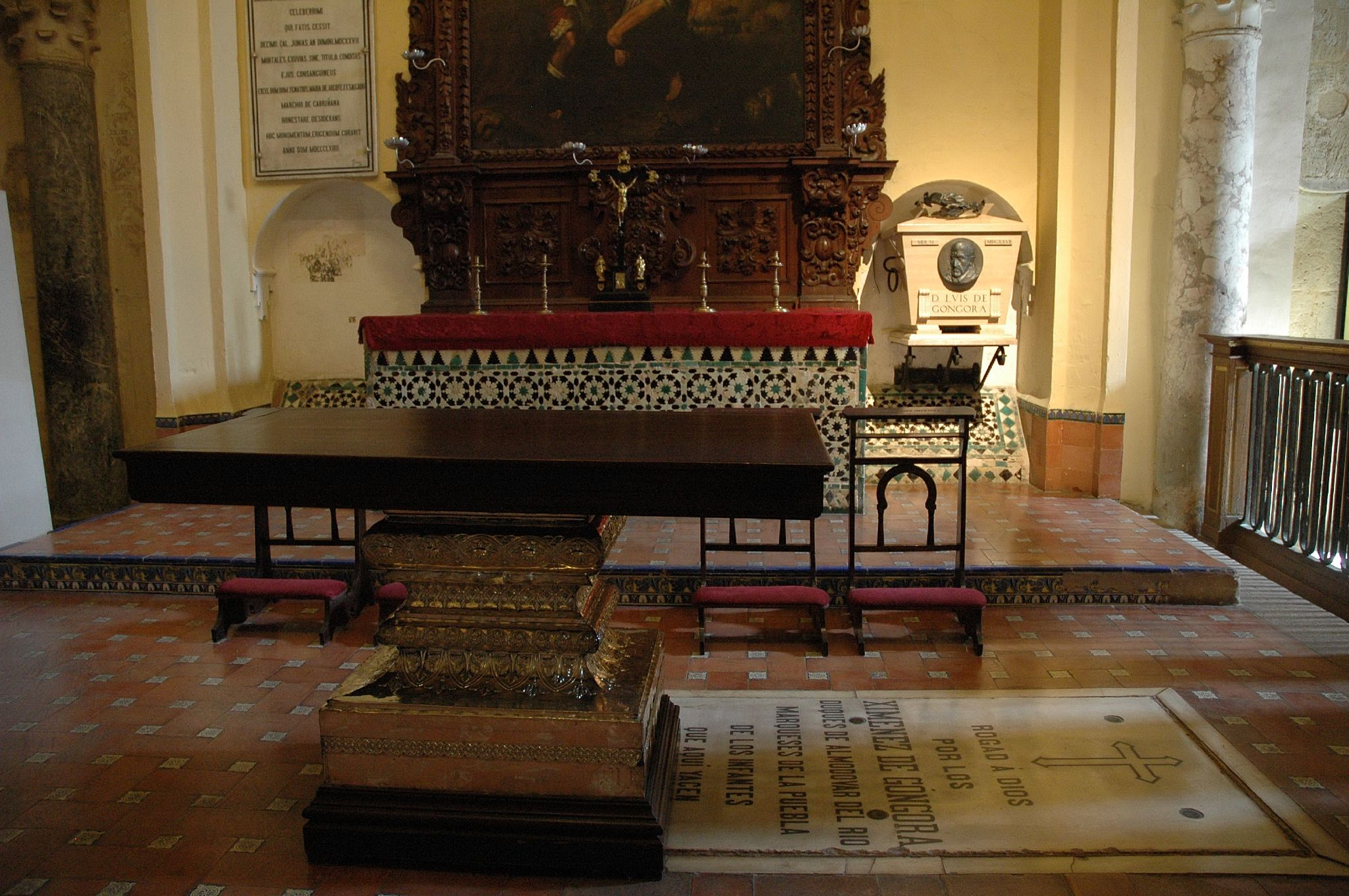 Capilla de San Bartolomé de la Mezquita de Córdoba (España). En ella reposan los restos de Luis de Góngora y Argote.